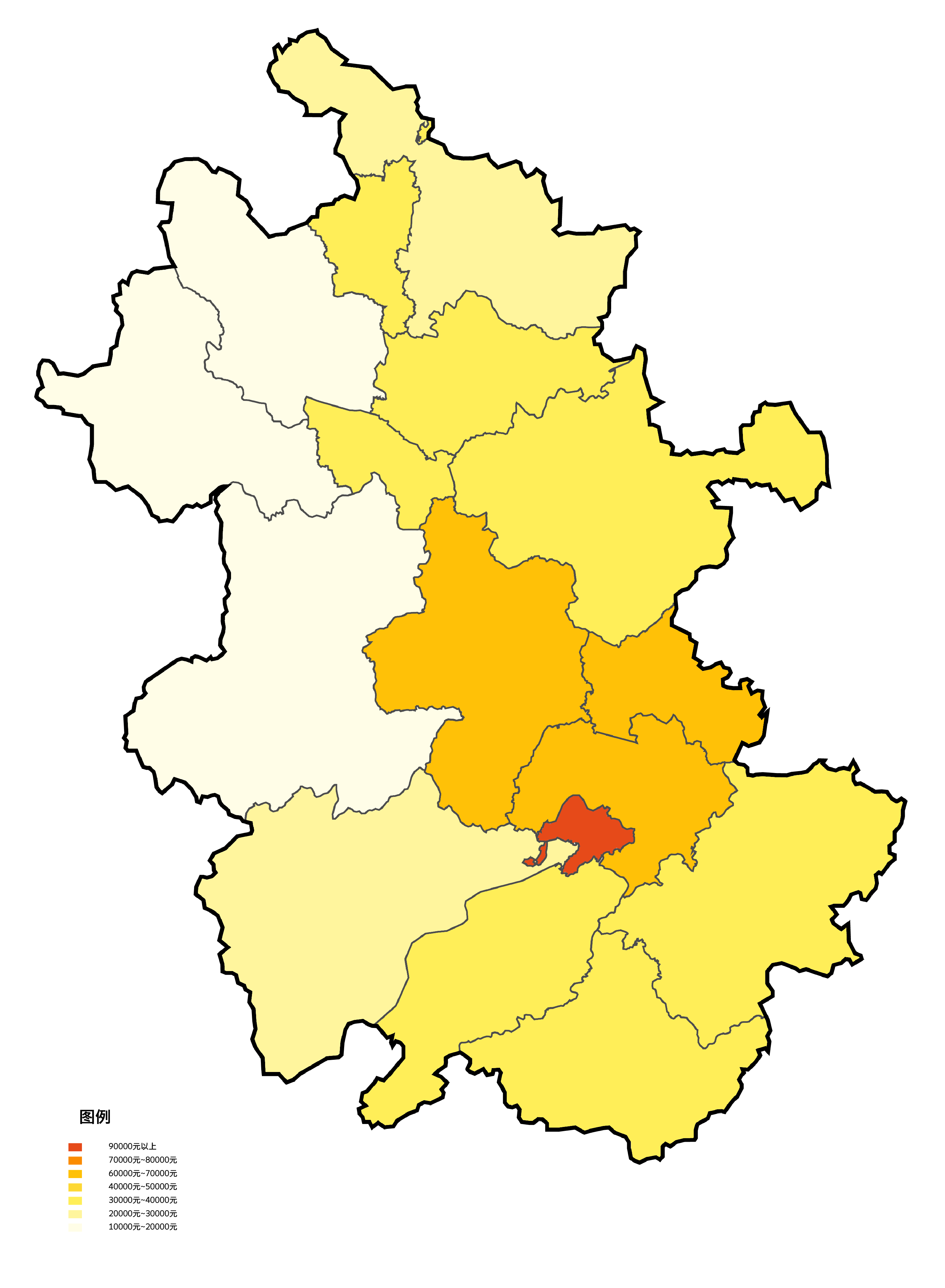 中文（中国大陆）: 安徽省各地级市根据2014年人均地区生产总值填色地图